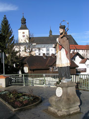 Stadt Regen, Bild von Ludwigsbrücke auf Pfarrkirche, selbst fotografiert am 26.12.2004